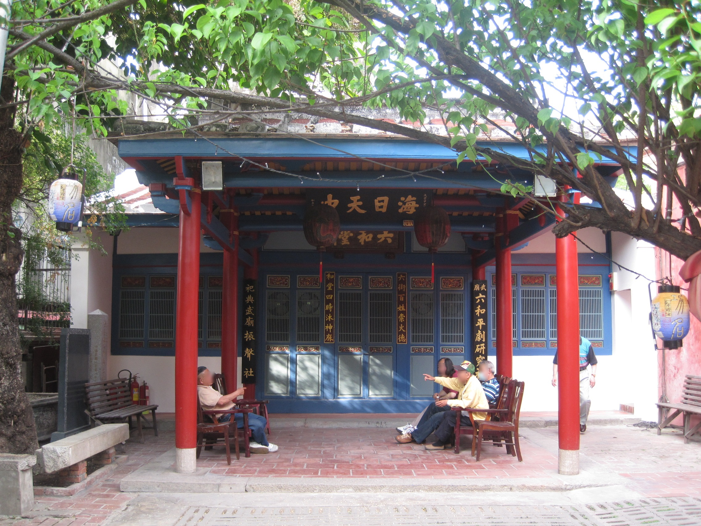 祀典武廟六和堂